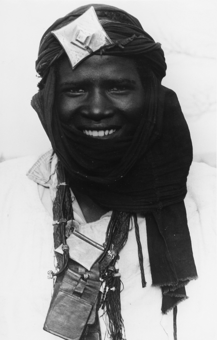 Om de hals draagt de jongen diverse amuletten, bestaande uit leren envelopjes, meestal gevuld met spreuken uit de Koran op stukjes papier die de drager bescherming moeten bieden tegen allerlei onheil. Een zelfde type amuletkettingen wordt gedragen door een Bella man op foto 20010119.